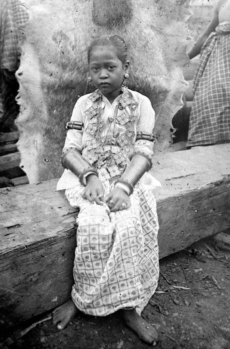 Negatief. In de 19e eeuw was Mario ri Awa een rijkje dat leenplichtig was aan het vorstendom Soppeng, gelegen ten zuiden van het meer van Tempe en grenzend aan het rijkje Tanette. In de 20e eeuw was het een district geworden van het toen zelfbesturende landschap Soppeng. De foto toont het dochtertje van de Datu, herkenbaar aan haar vele sieraden, waarmee haar vader zijn macht, rijkdom en aanzien moest laten zien. Sieraden waren ook een soort spaarpot; in slechte tijden kon men ze verkopen. Vaak waren het overigens erfstukken die men niet gauw zou verkopen. (P. Boomgaard, 2001). Dochtertje van de vorst (datu) van Mario-ri-wa met gouden sieraden, te Sopeng, Zuid-Sulawesi.